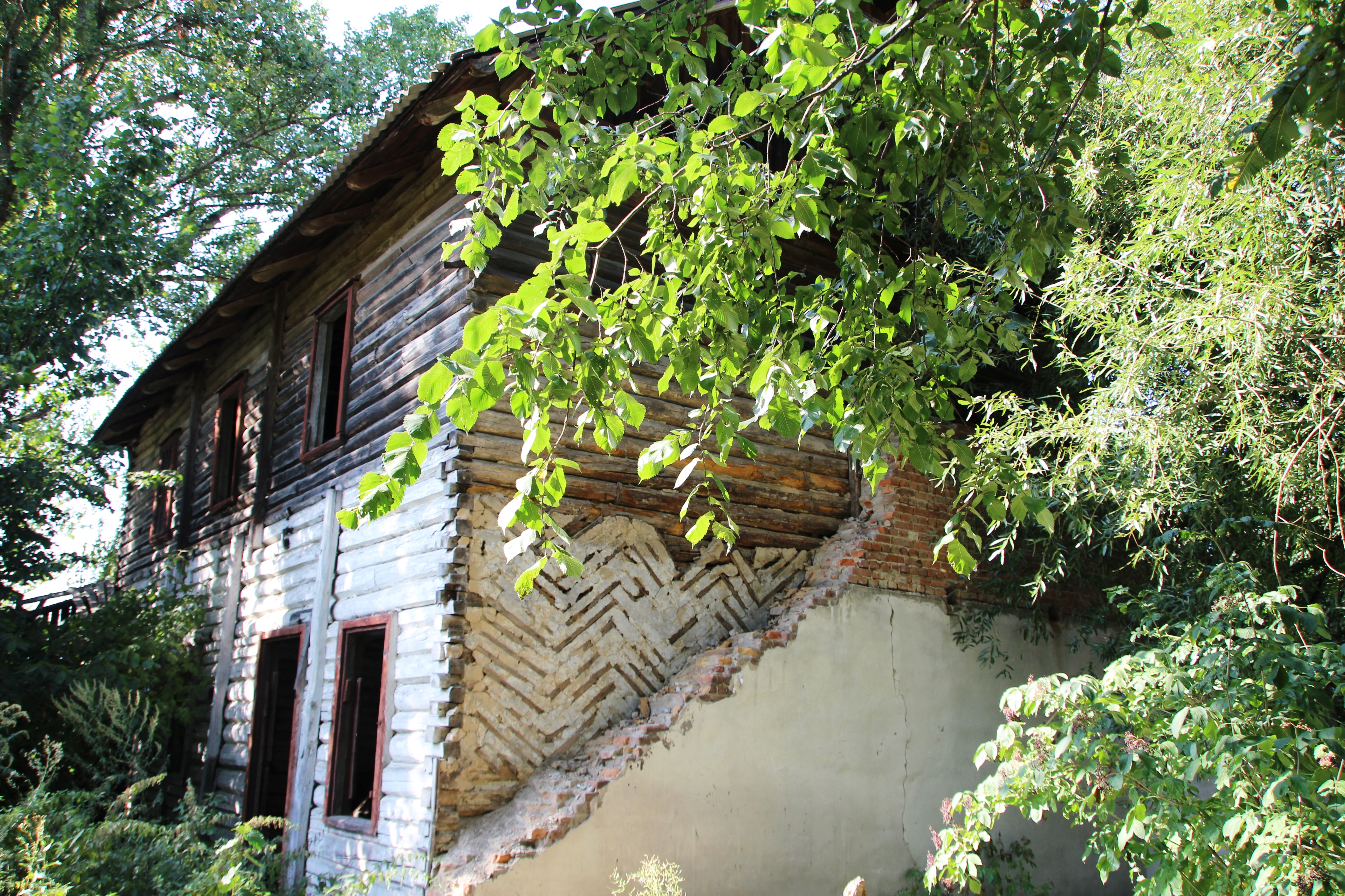 село Шевченкове Конотопський район, руїни садиби Лазаревських